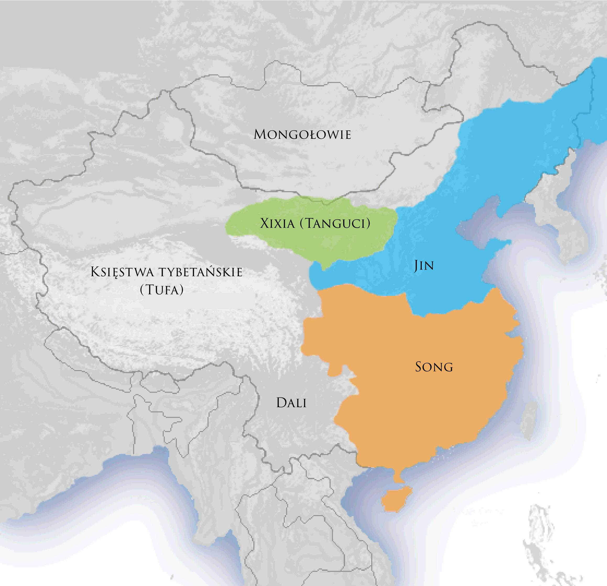 Dynastie Song i Jin, tanguckie państwo Xixia, księstwa tybetańskie, państwo Dali (Nanchao) i Mongołowie ok 1150